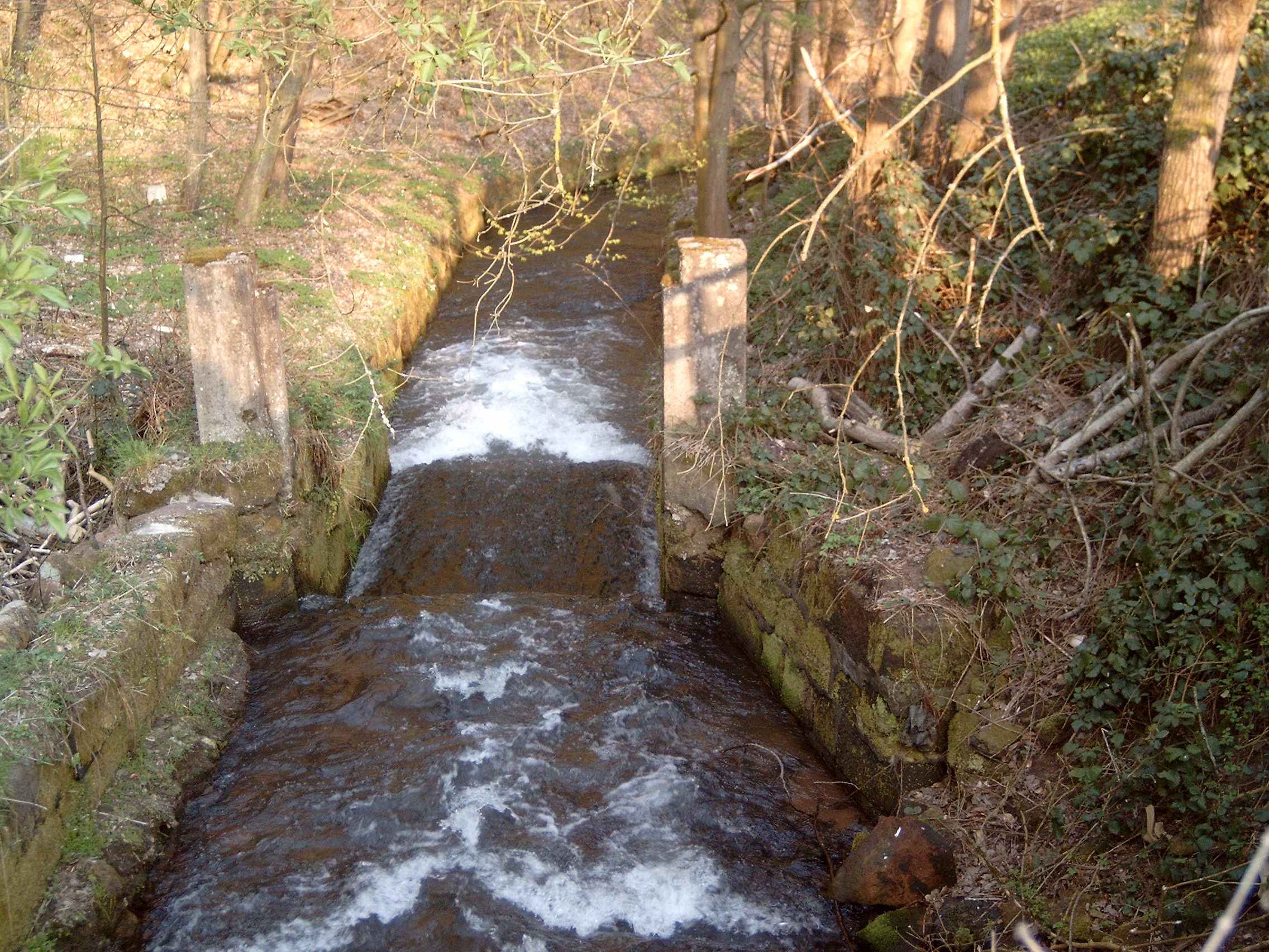 Hochspeyerbach bei Weidenthal